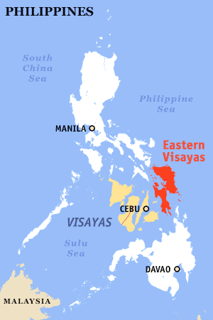 Cebuano: Mapa sa Pilipinas na nagapakita kon asa nahimutangan ang Sidlakang Kabisay-an. Gihimo ug gi-copyright (2003) ni seav sa Iningles na Wikipedia. Gipagawas sa ubos sa GNU FDL.